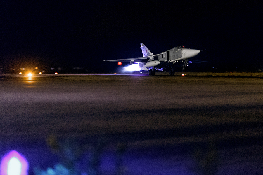 Ночные вылеты с авиабазы «Хмеймим» в Сирии